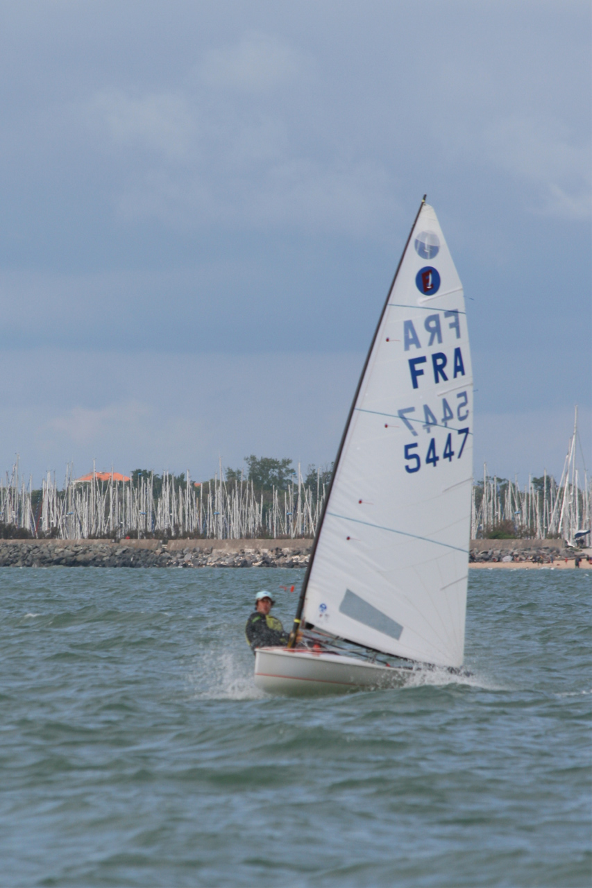 Dériveur Classe Europe dans la baie de la Rochelle